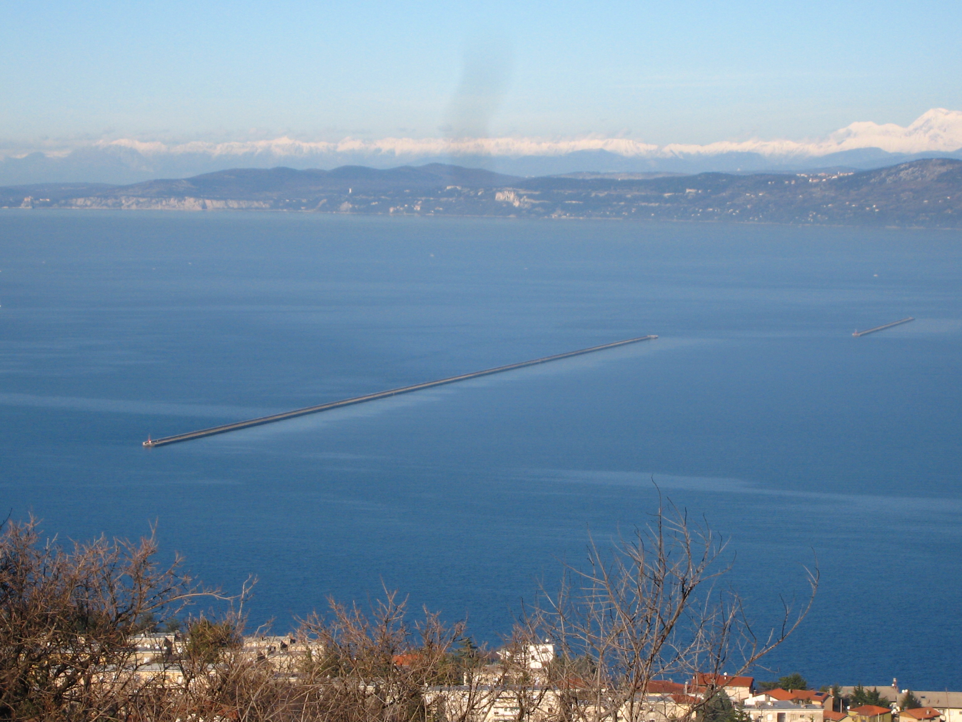 Dighe foranee a Trieste. Gennaio 2008